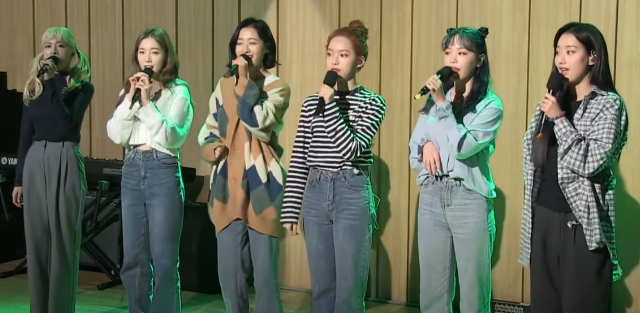 2020년 4월 23일 두시탈출 컬투쇼 LALALILALA - 에이프릴(APRIL) LIVE